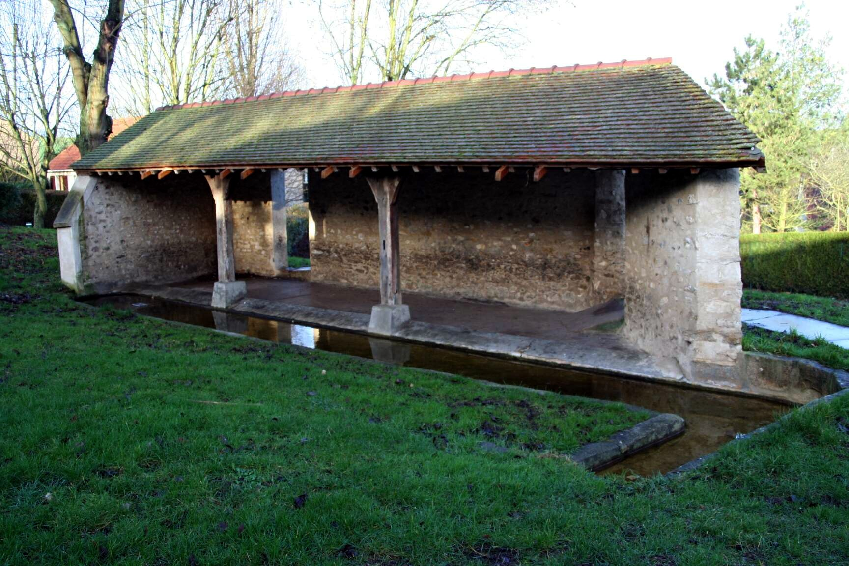 Lavoir de Jouy-Mauvoisin - Yvelines (France).